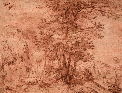 Pieter I Bruegel, Dorpsgezichten met bomen en een muildier, 1526-1569, tekening op papier, 202 x 258 mm.